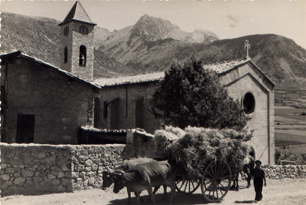 Iglesia de Gósol, Lleida, 1960